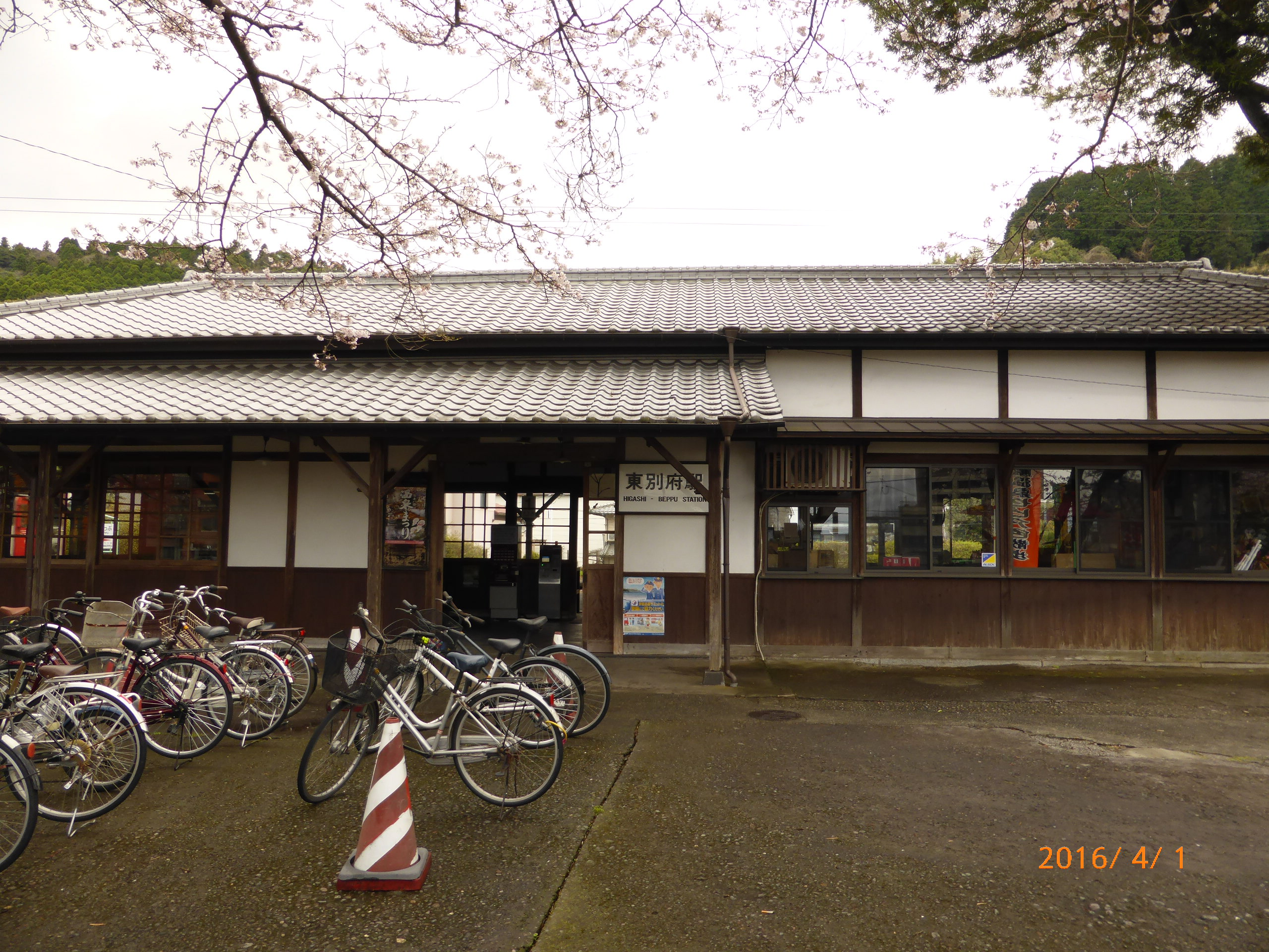 JR東別府駅の正面からの画像。